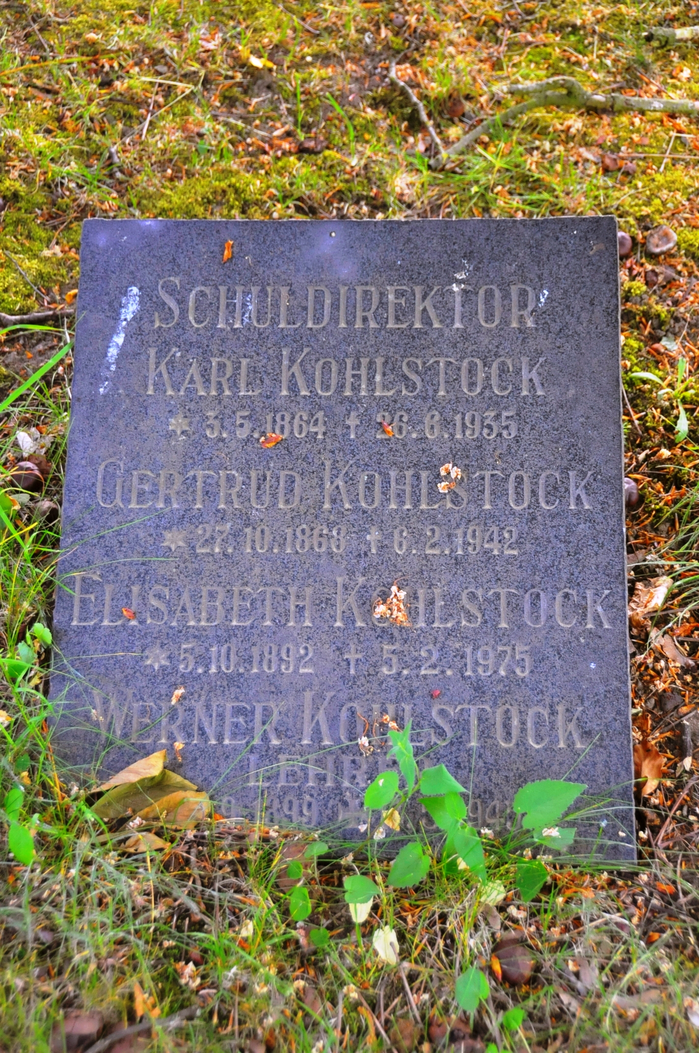 Grabstätte von Karl Kohlstock auf dem Hauptfriedhof Gotha